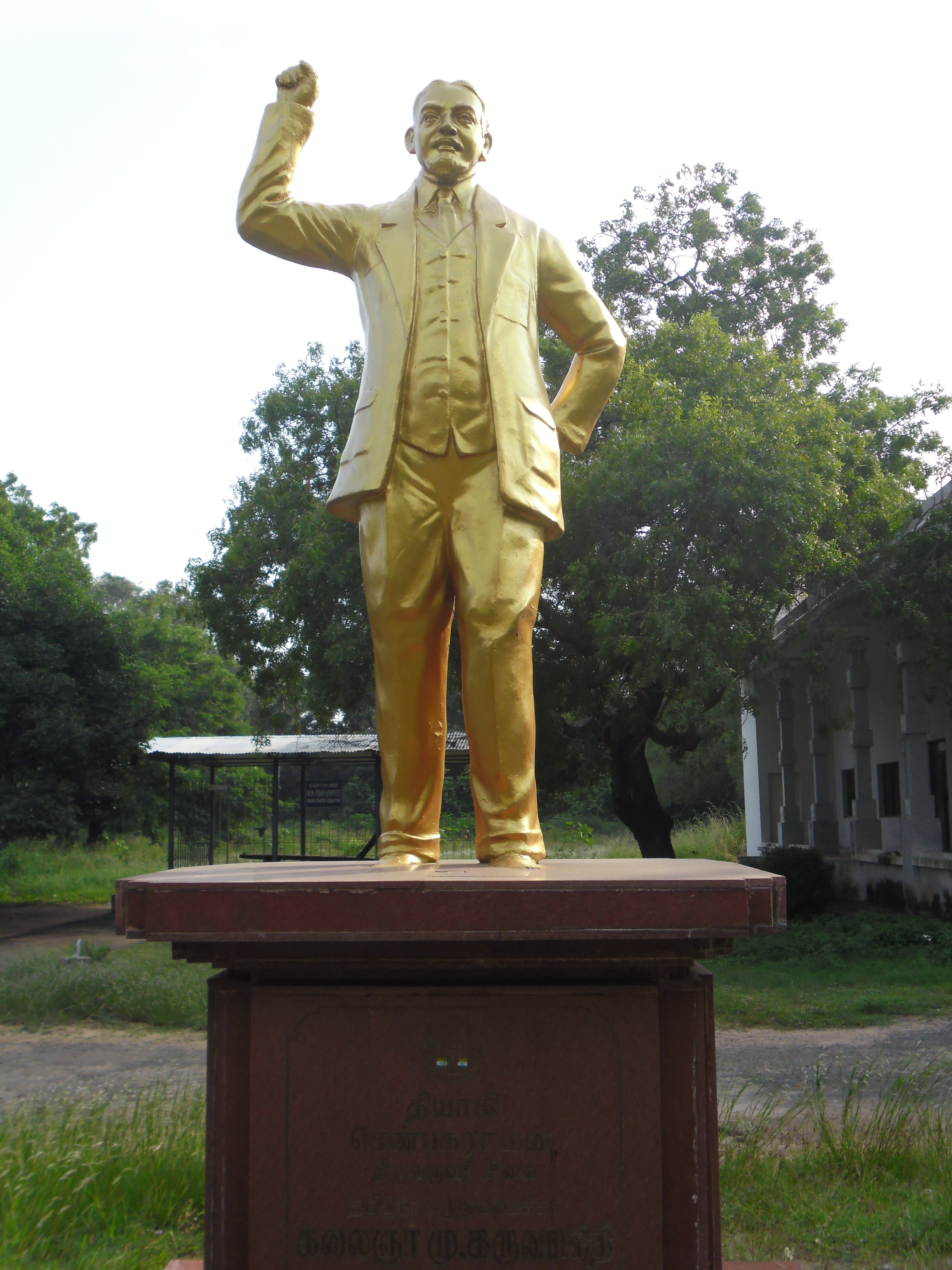 மாவீரன் செண்பகராமன்